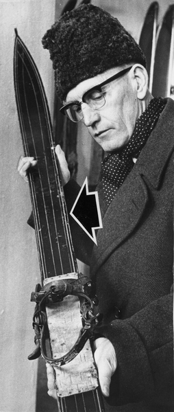 portrett, mann, lektor, skihistoriker, stående halvfigur, ski.